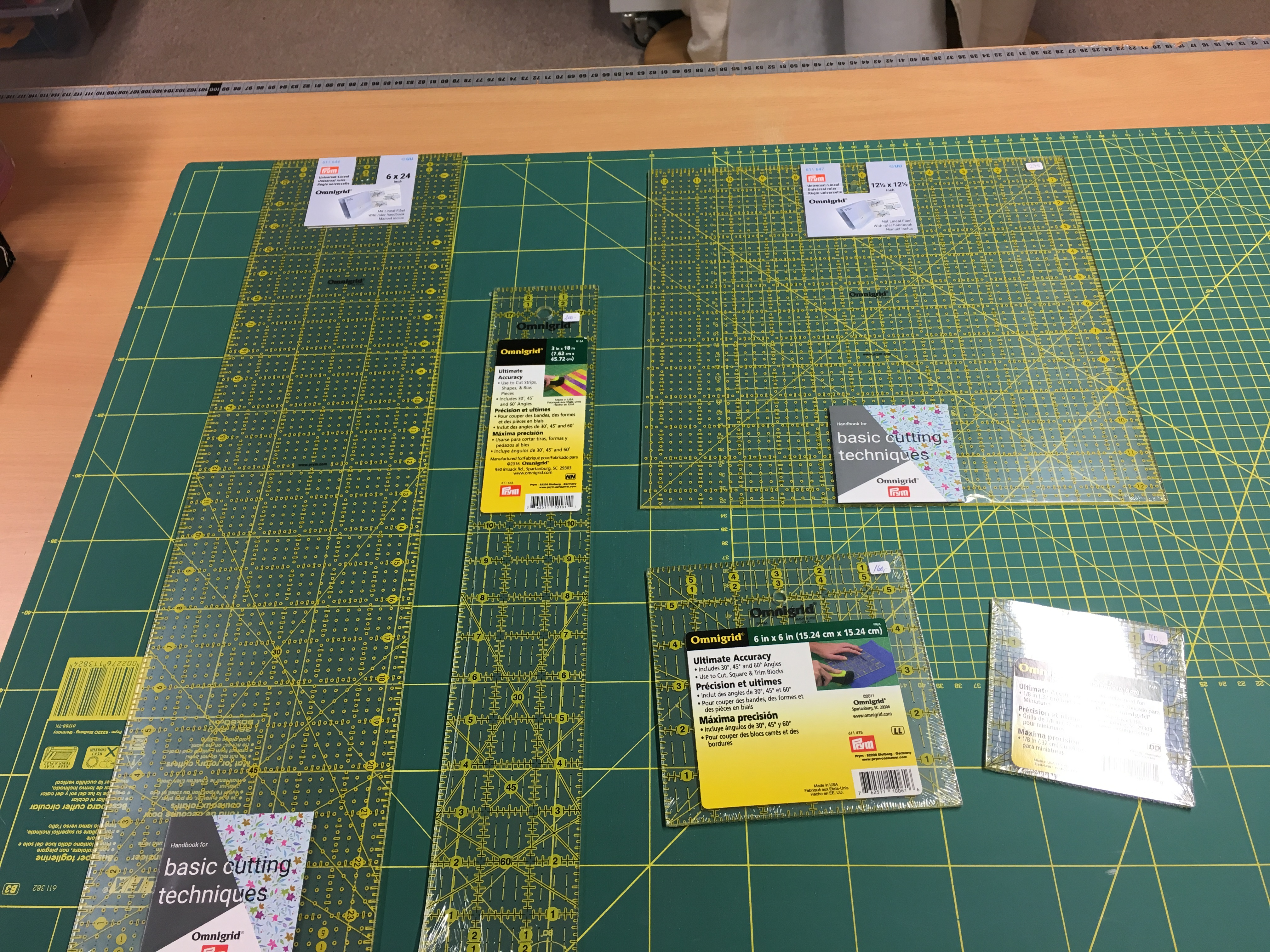 Linealer til patchwork fåes i rigtig mange størrelser og faconer. De fåes også med både cm og med Inch, som alle udlandske mønstre er syet efter.